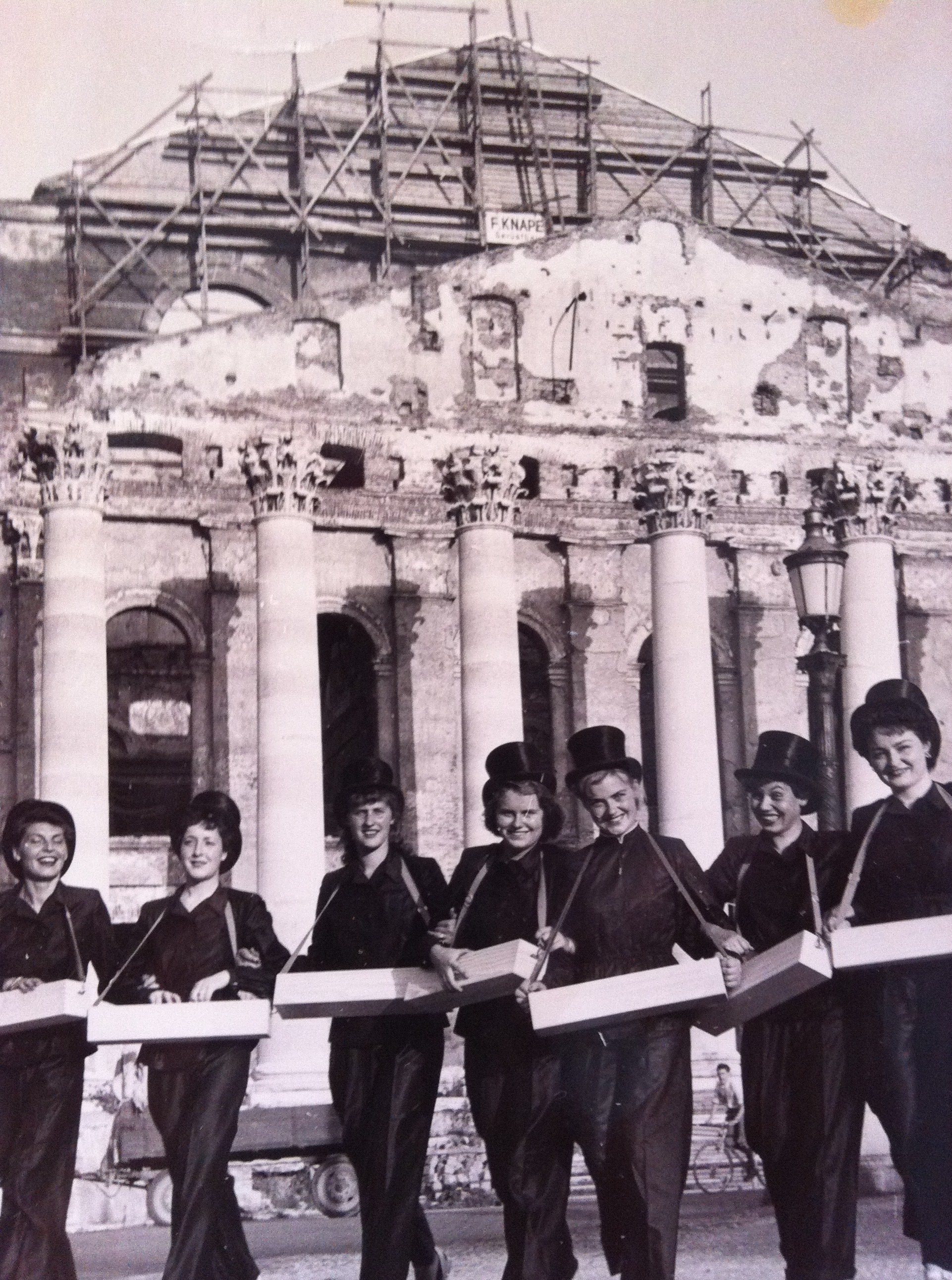 Losverkäufer der von den Freunden des Nationaltheaters organisierten Weihnachtstombola für den Wiederaufbau des Nationaltheaters München in den 1950er-Jahren.